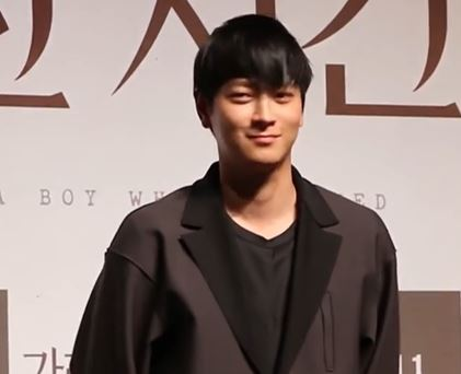 2016년 10월 11일 영화 '가려진 시간' 제작보고회